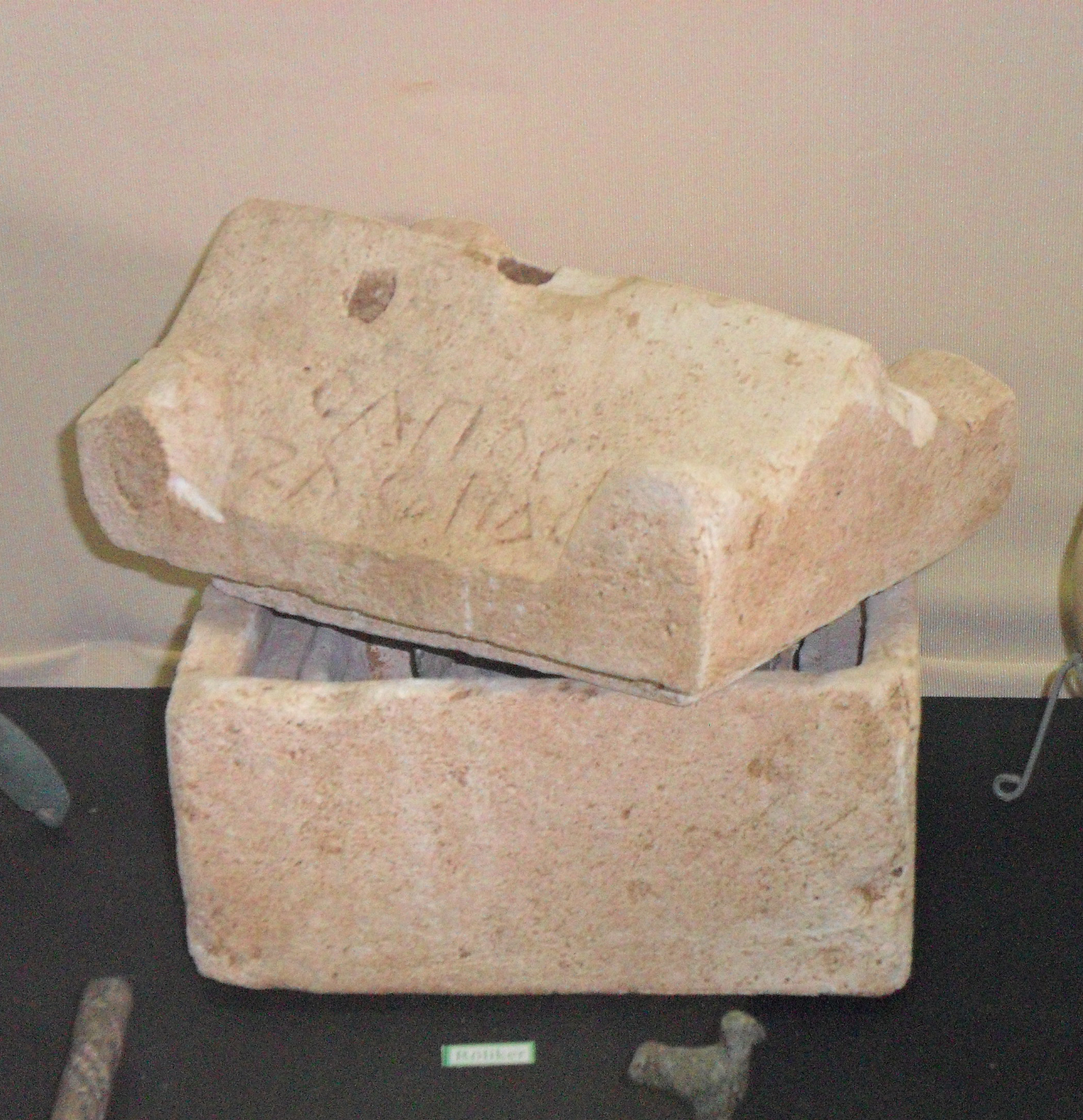 Silifke Müzesinde sergilenen bir röliker.